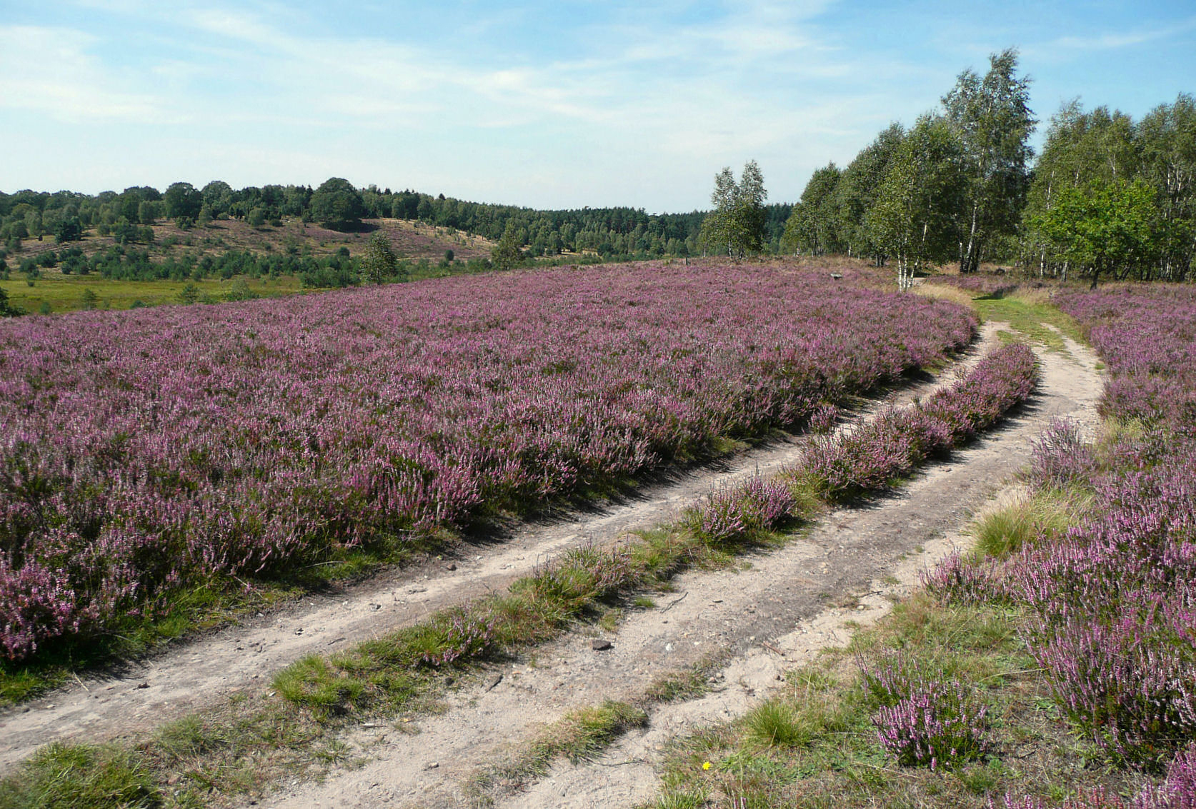 Heidesandweg bei Niederhaverbeck mit Blick auf den Wümmeberg